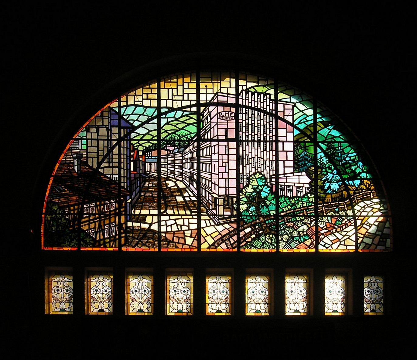 Glasmosaik im Südfenster des Eisenacher Bahnhofs. Es zeigt die Uhrenfabrik Ruhla.